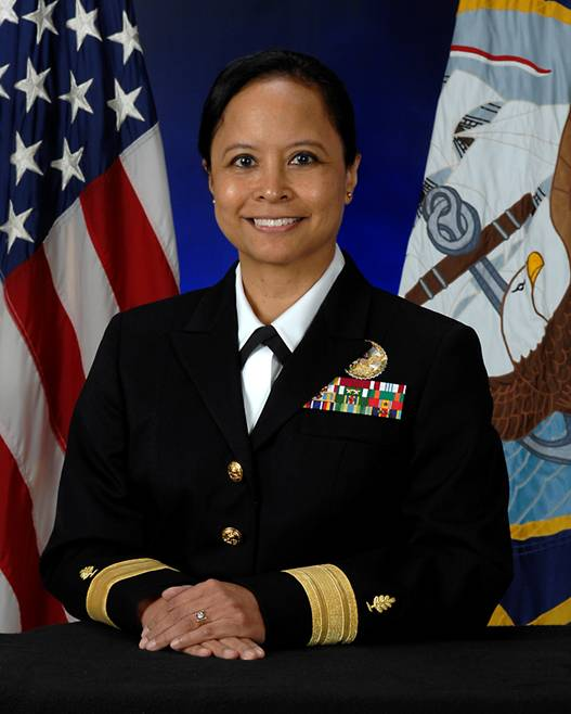 Rear Admiral Eleanor V. Valentin